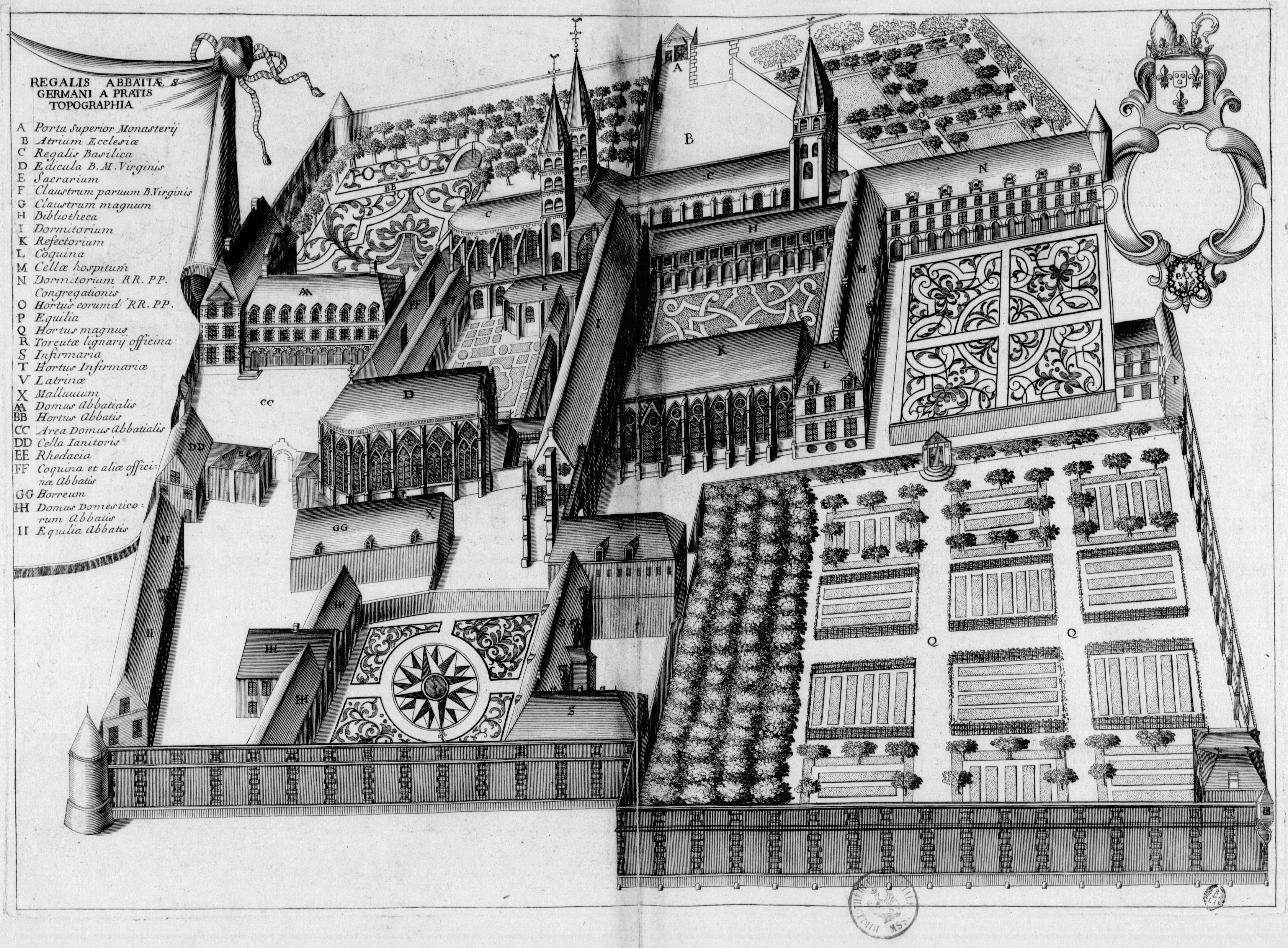 Planche gravée du 17ème siècle représentant l'abbaye de Saint-Germain-des-Prés, dans le livre Monasticon Gallicanum.